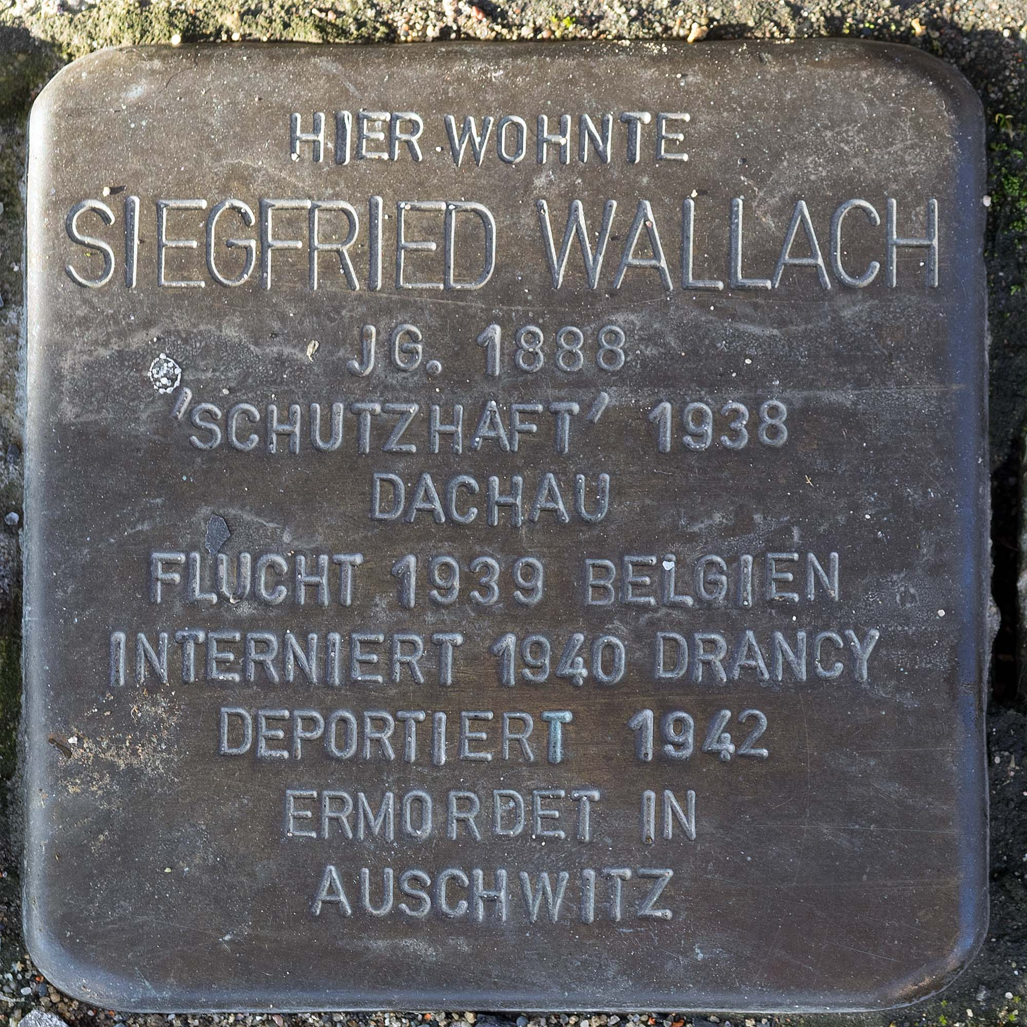 Stolperstein für Wallach Siegfried